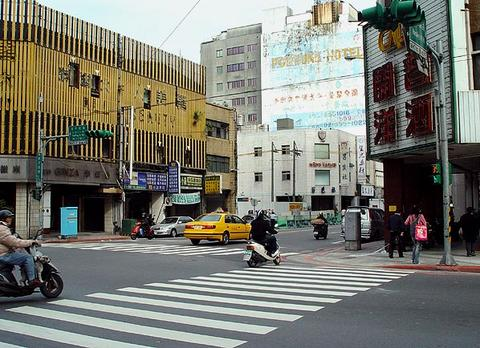 中文（台灣）: 臺北市大同區南京西路與延平北路一段路口。